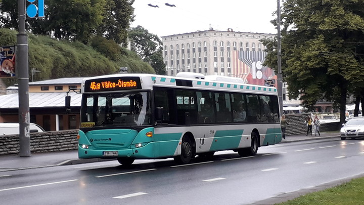 Bussiliin 46 sõitmas Kaarli puiesteel